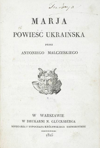 Okładka powieści "Maria" Antoniego Malczewskiego